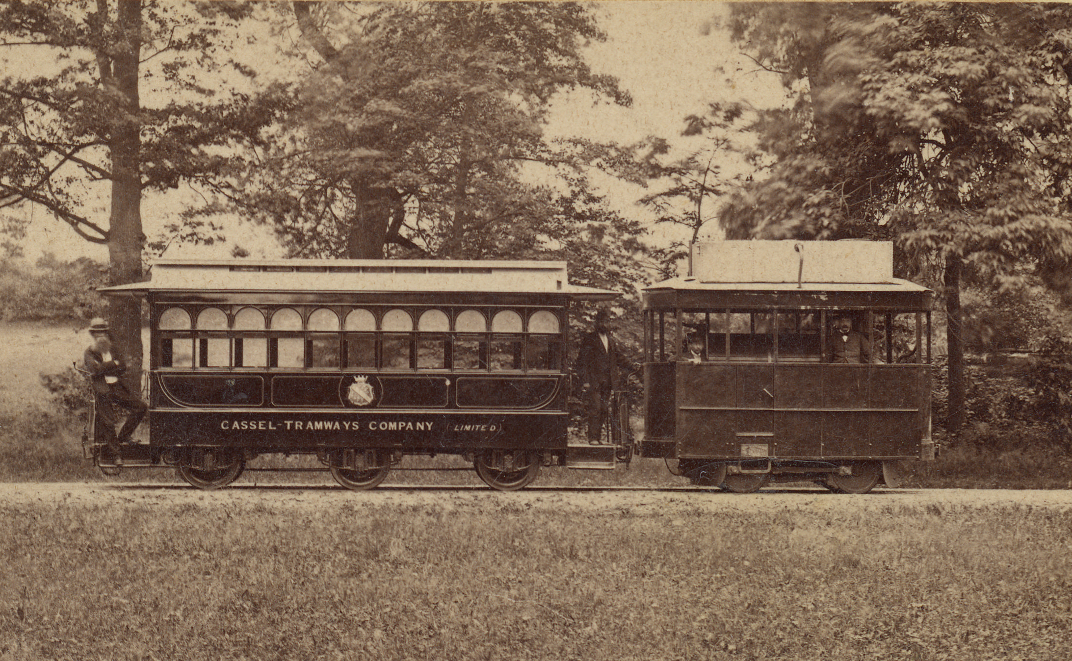 kasseler dampfstraßenbahn in wilhelmshöhe, zwischen 1877 und 1881 aufgenommen.